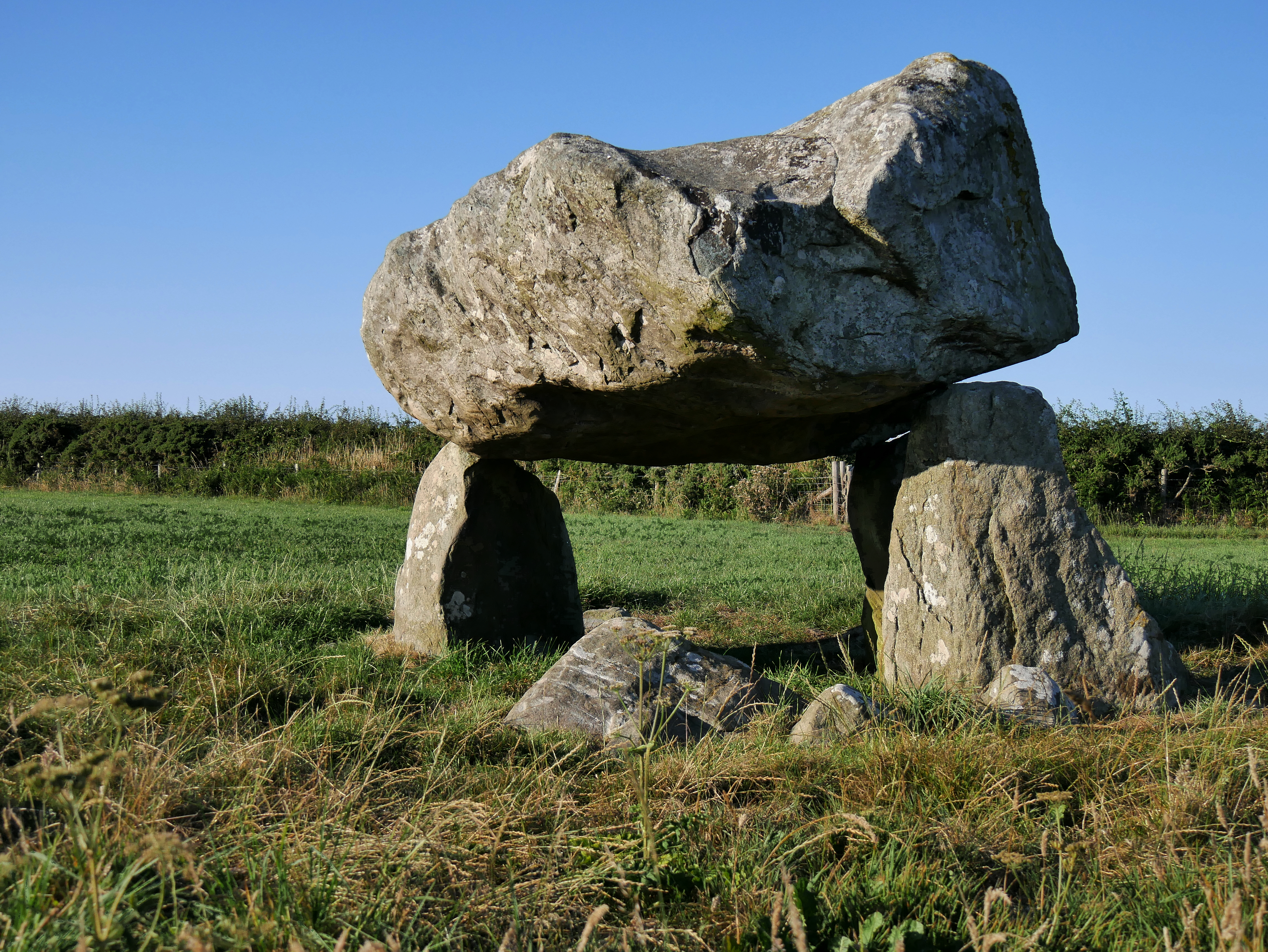 The Neolithic burial chamber Llech-y-Dribbed, or Llech-y-Trypedd, ¾ of a mile from the village of Moylgrove, in Pembrokeshire (Wales).